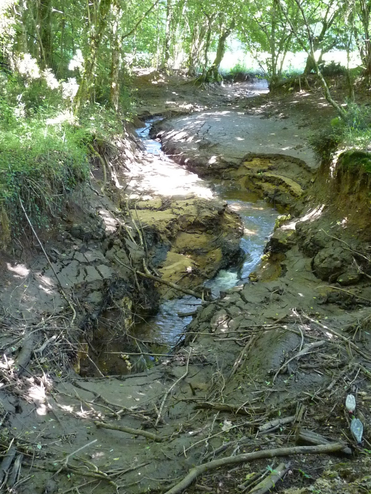 Gouffre du Bandiat, Chez Touchet, forêt de la Braconne. Rivières, Charente, France